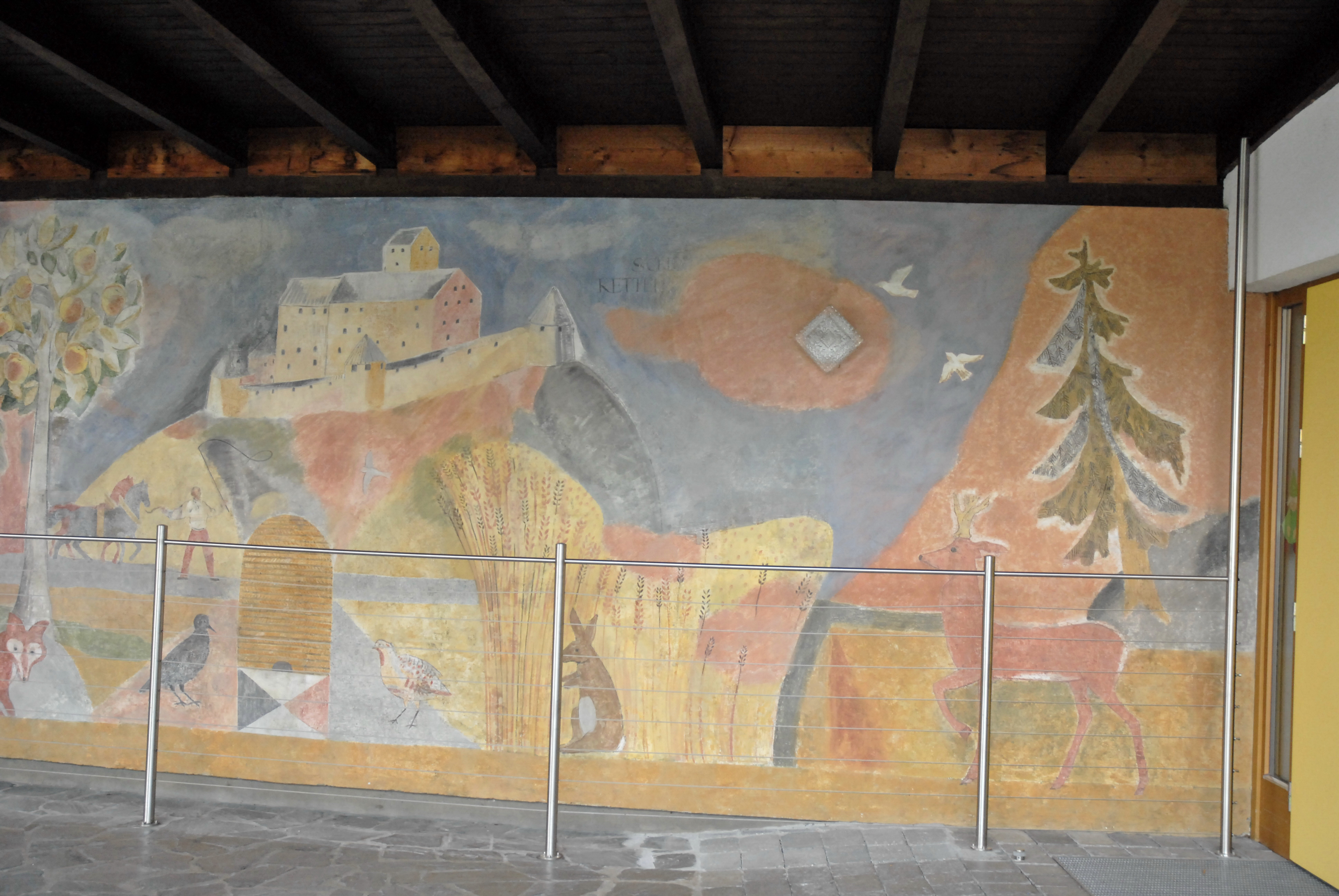 Kolsass, Wandbild Fiechterweg 4, rechter Teil